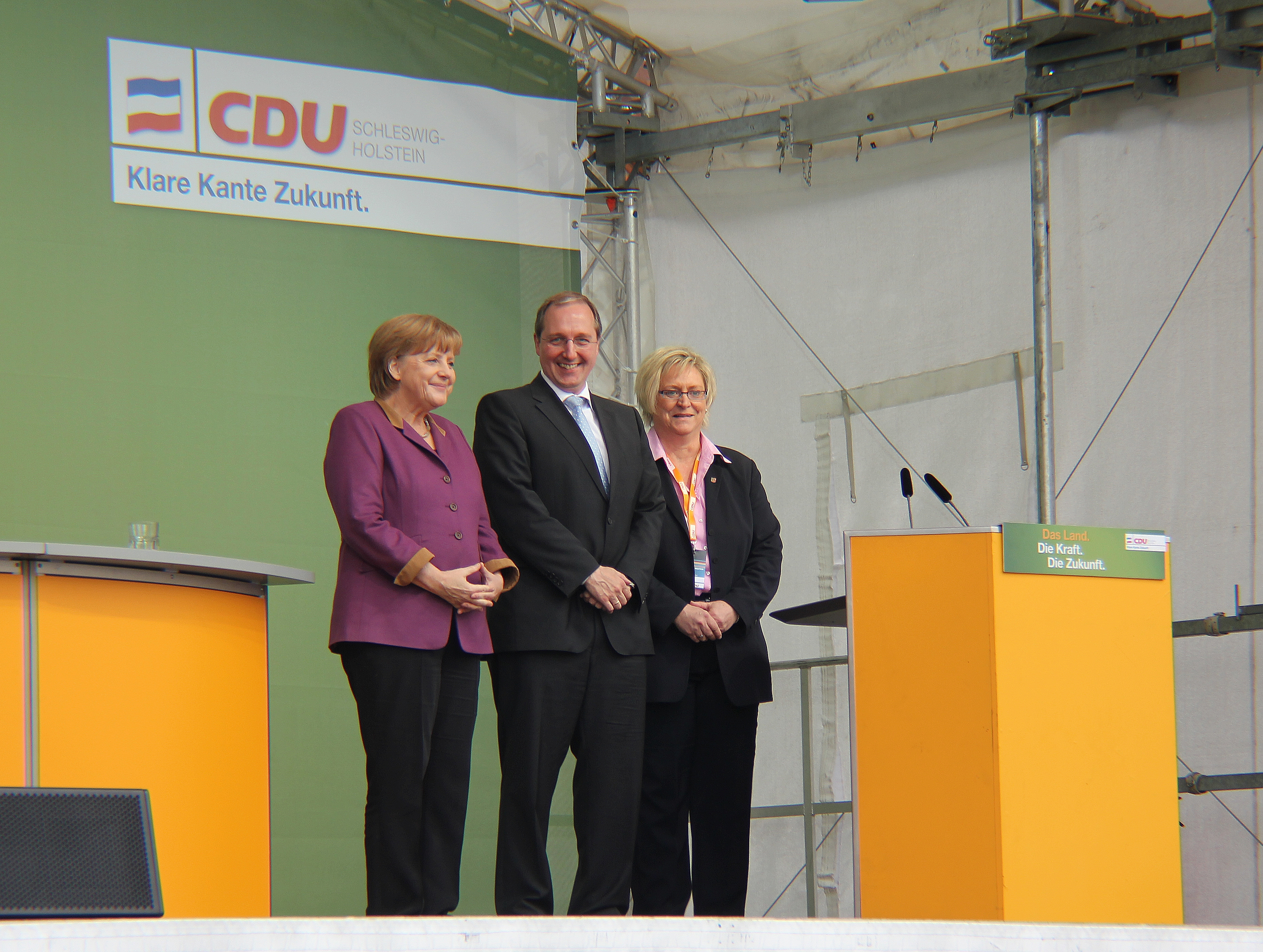 Angela Merkel und Jost de Jager sowie Susanne Herold in Flensburg zur Landtagswahl in Schleswig-Holstein 2012